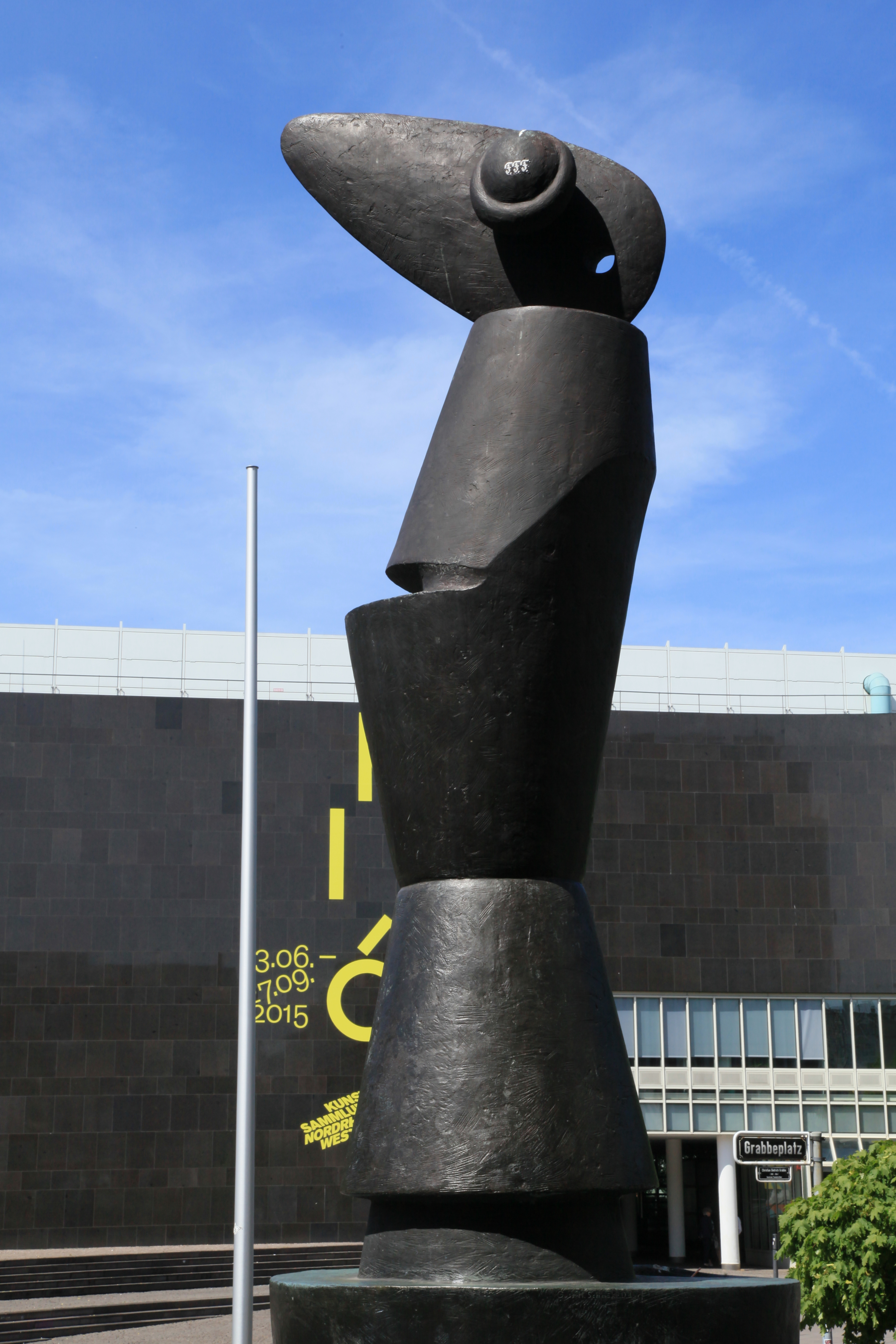 "Habakuk" von Max Ernst, Grabbeplatz vor der Kunsthalle in Düsseldorf